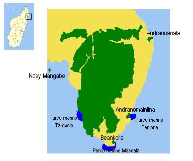 Masoala National Park map (Madagascar)